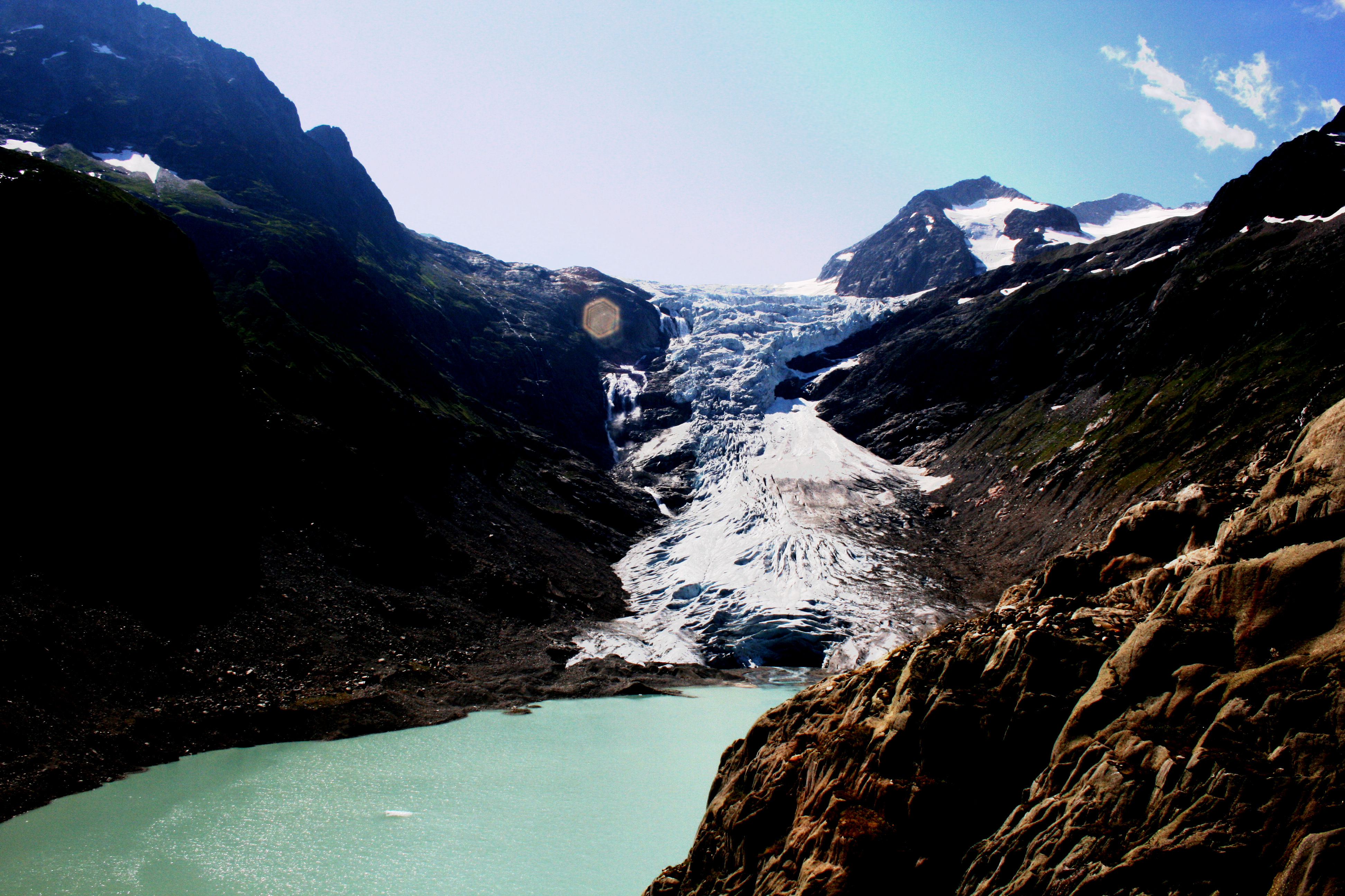 Triftgletscher, Blick nach Süden. Rechts hinter das Triftstöckli, 3035m